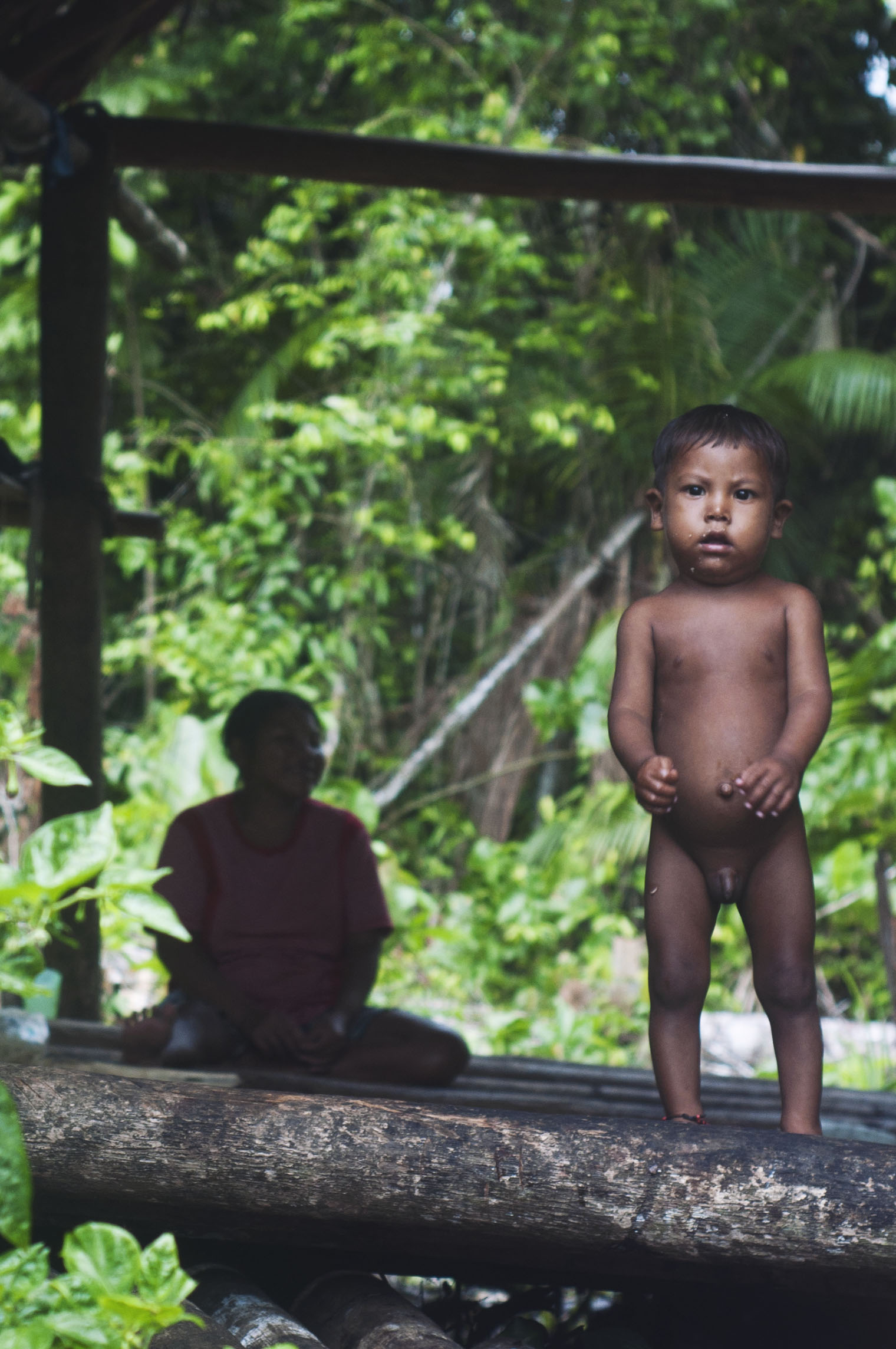 Niño de Warao